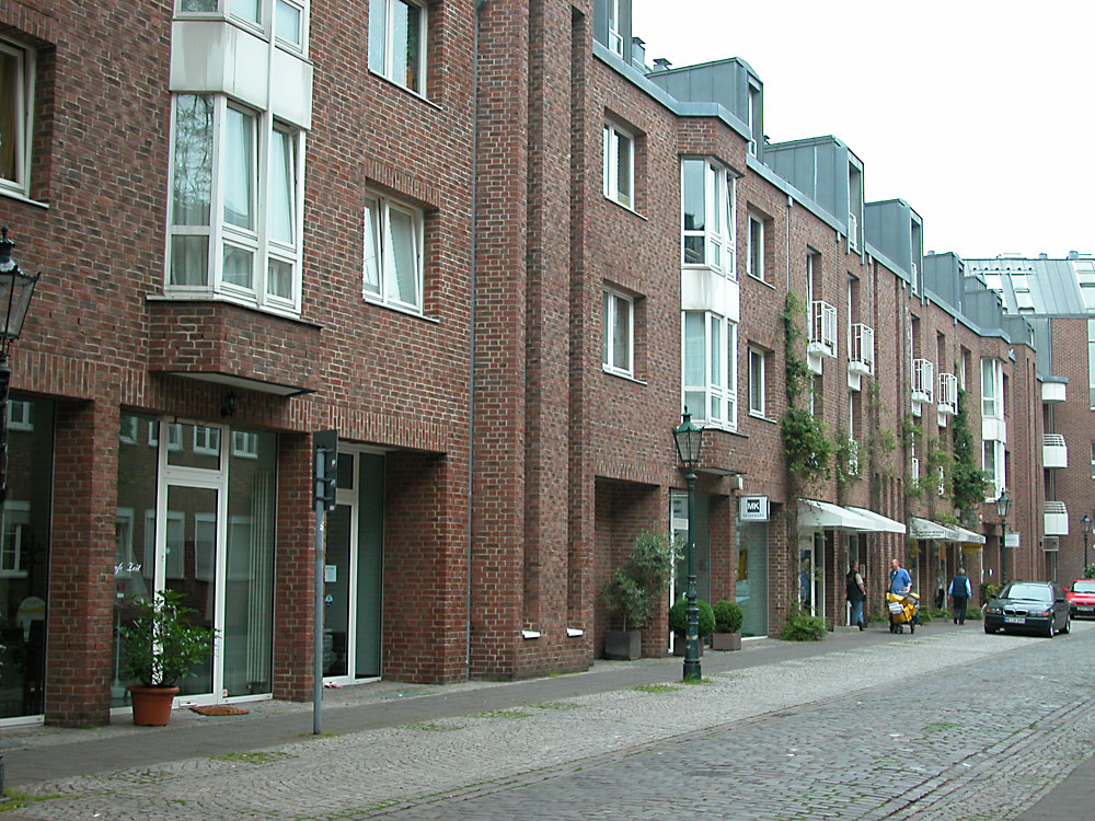 Akademiestraße, Düsseldorf-Altstadt